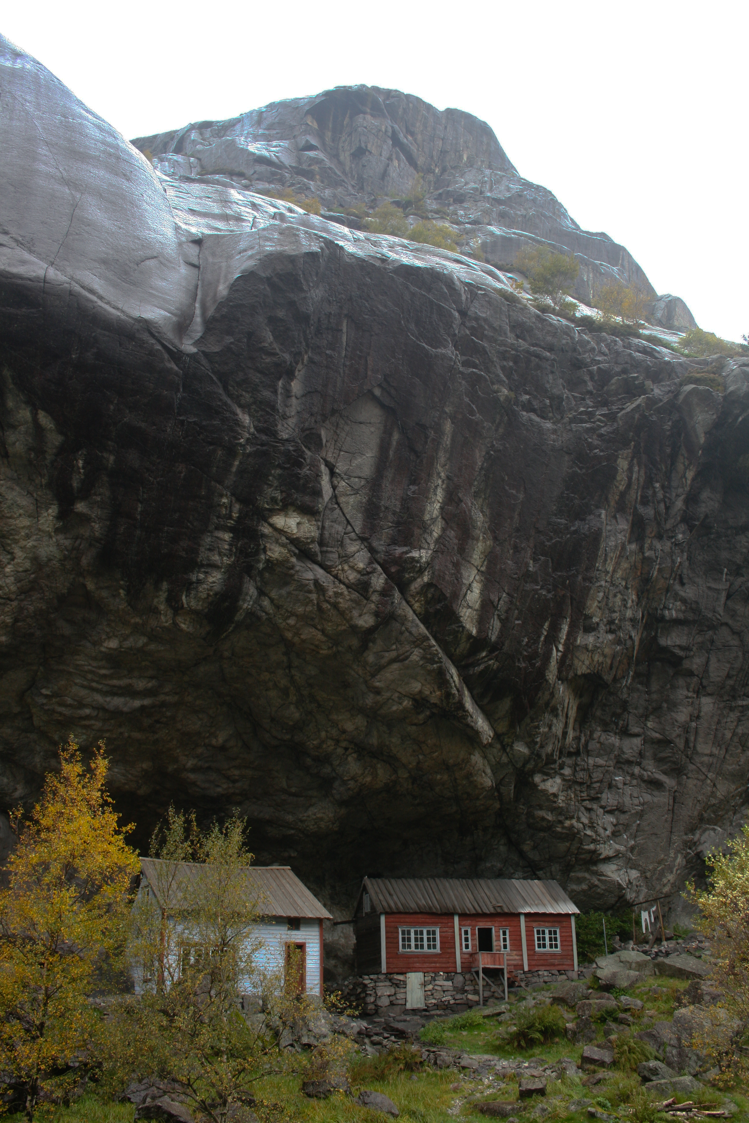 Hellaren i Jøssingfjord